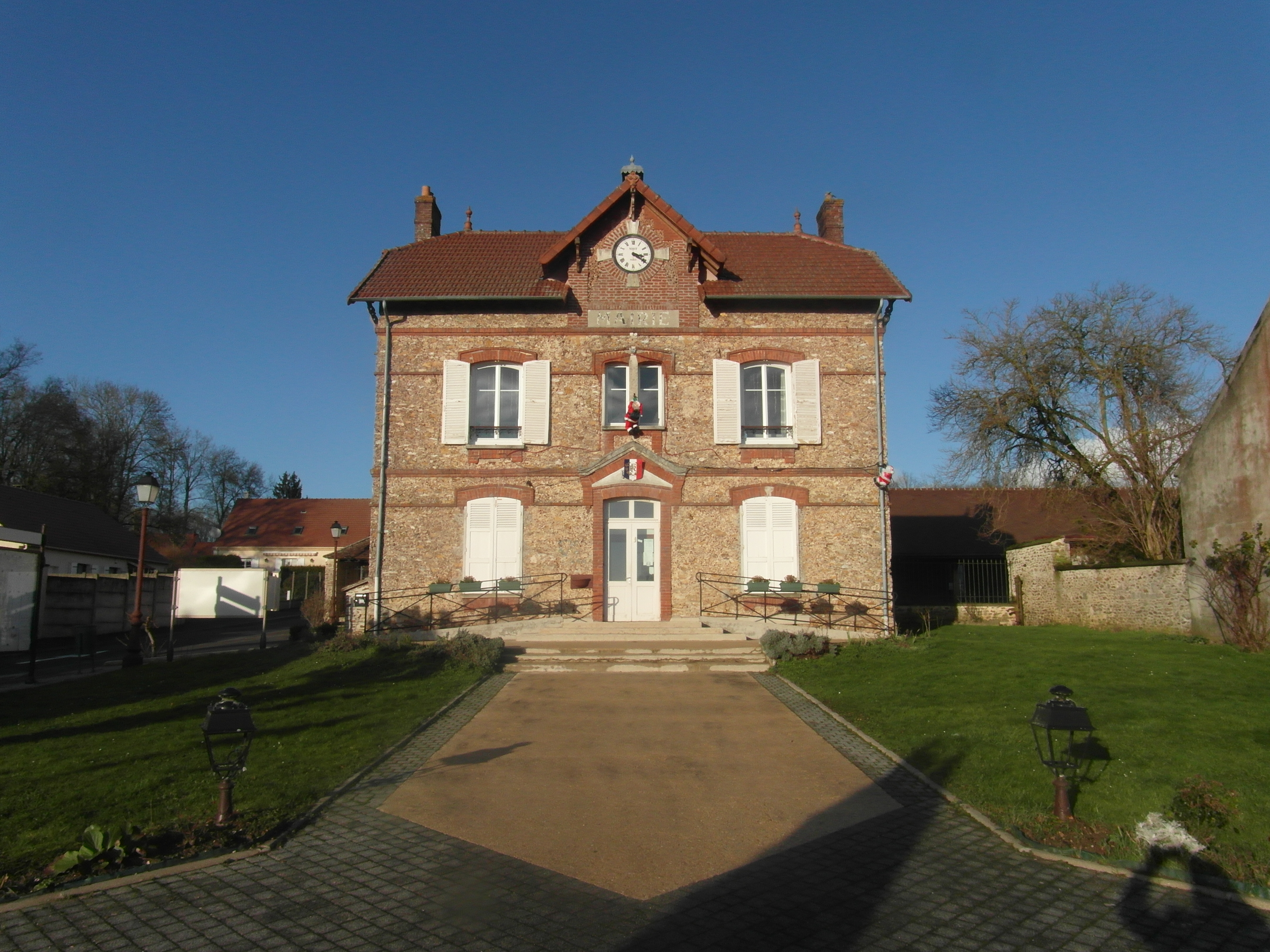 Mairie de Saint-Ouen-en-Brie (Seine-et-Marne)